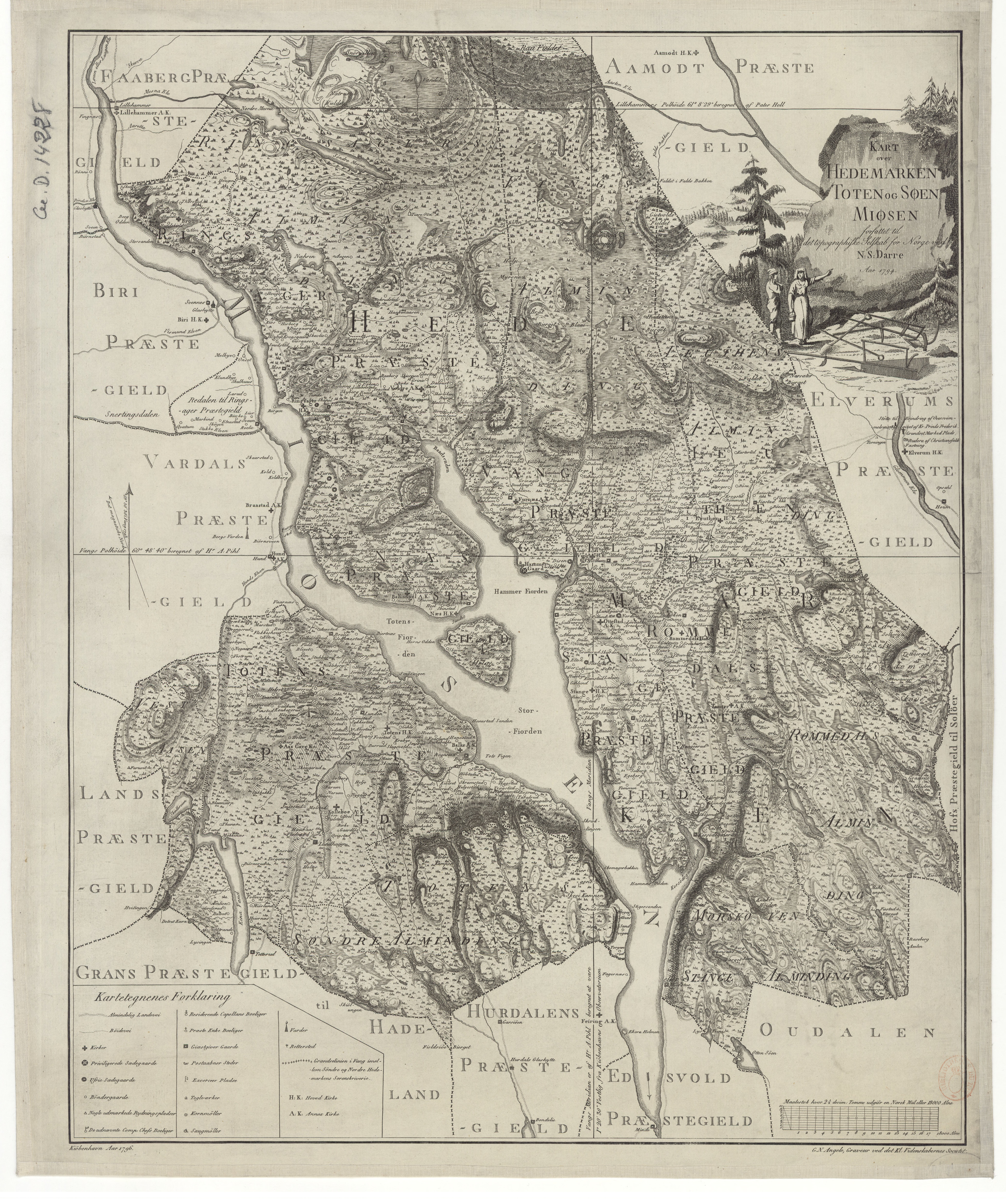 Kart over Hedemarken, Toten og Søen Miøsen